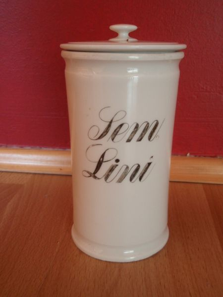 sztanglas z sygnaturą siemienia lnianego